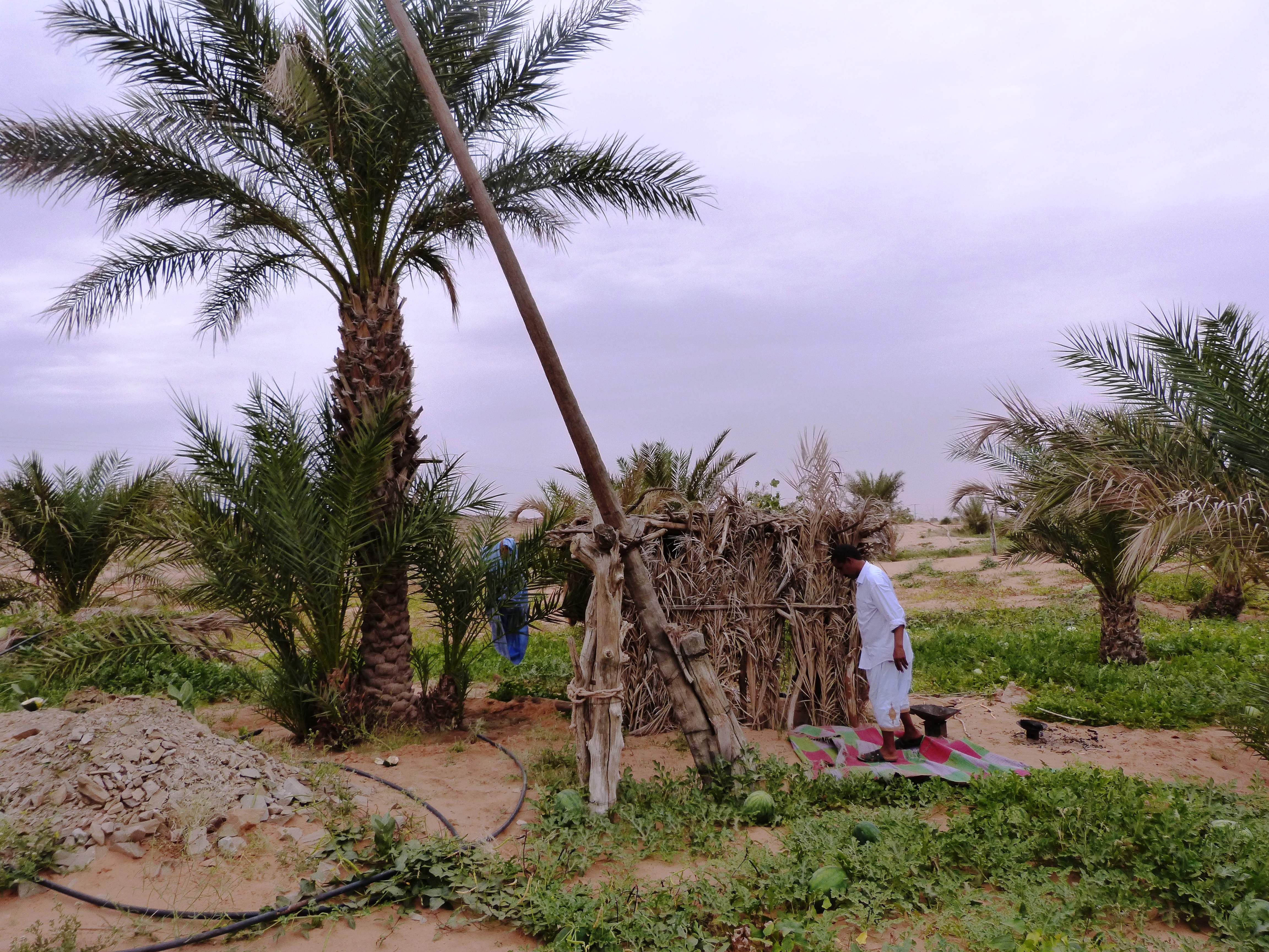 Travail dans sa palmeraie ( Nov 2016 ) Tidjikja centre Mauritanie This is an image of "African people at work" from Mauritania